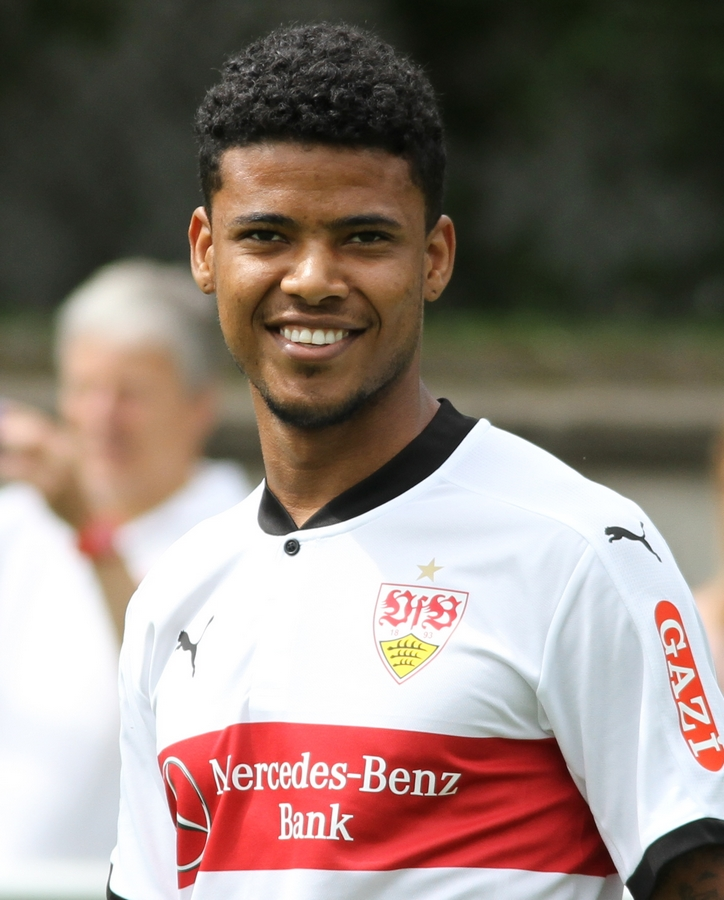 Ailton beim Saison-Opening 2017